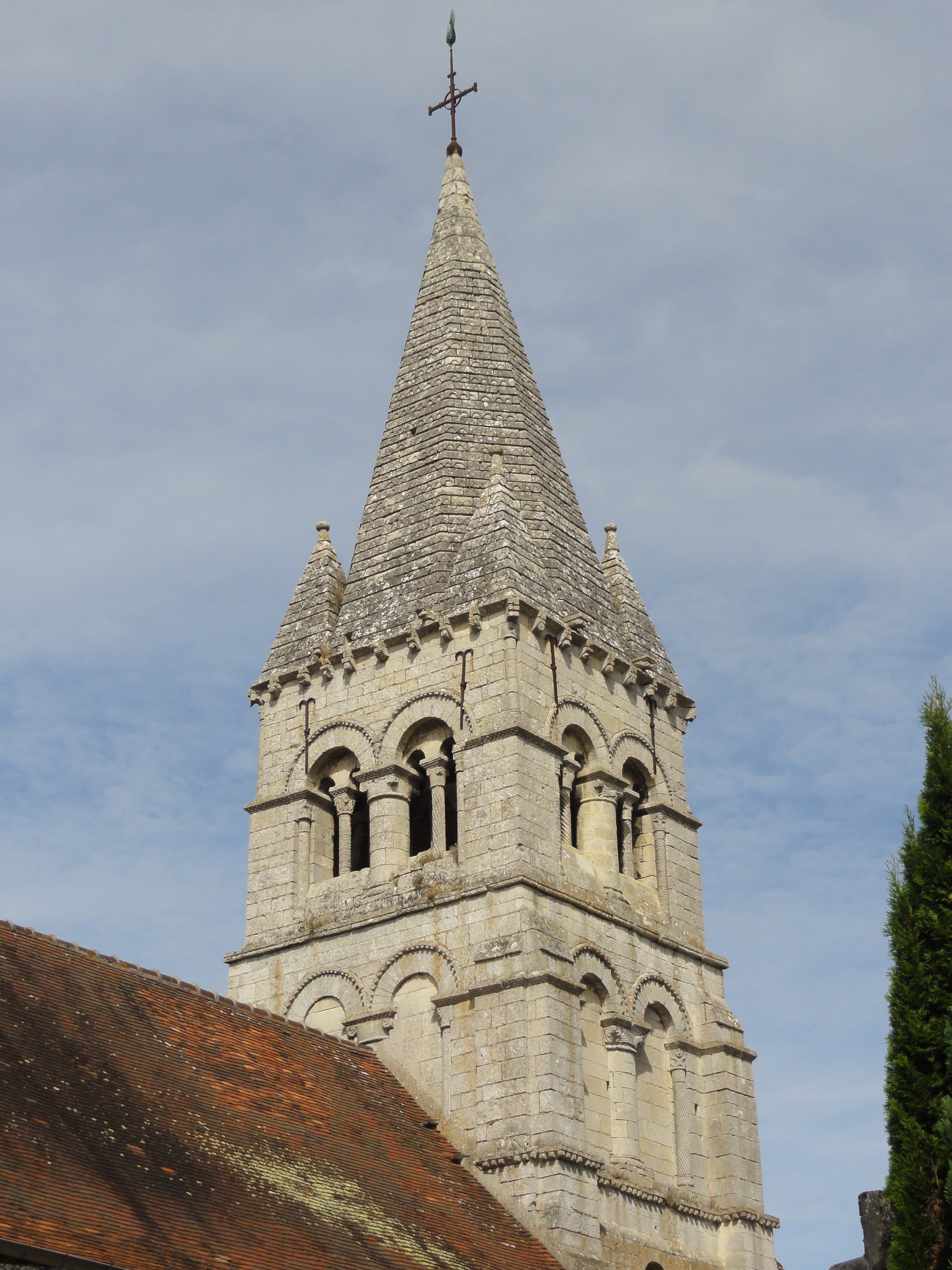 Église Saint-Vaast de Saint-Vaast-de-Longmont (voir titre).